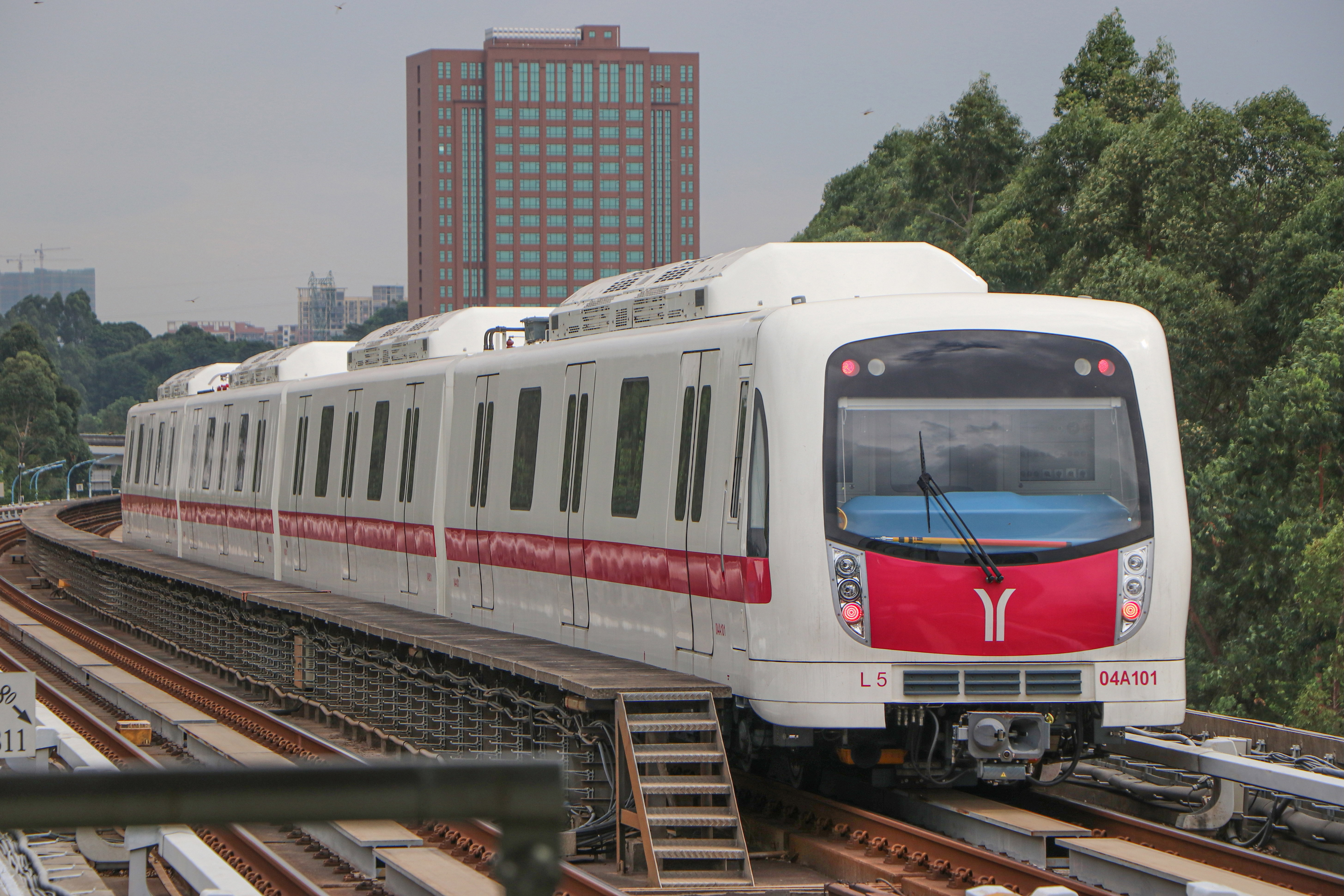 广州地铁4号线四方制L5型列车